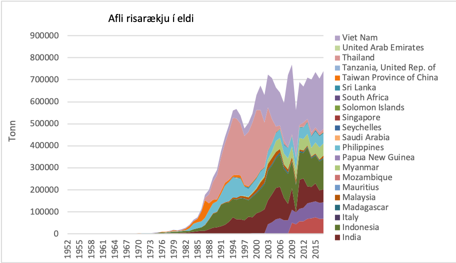 Heildarafli risatígrisrækja